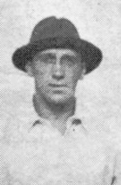 El futbolista José María Belausteguigoitia, "Belauste" durante su participación en los Juegos Olímpicos de Amberes 1920 con la selección de España.